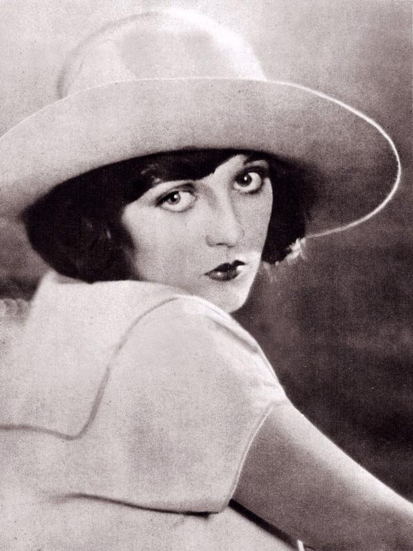 Dorothy Dwan (1906 - 1981), actrice américaine du cinéma muet